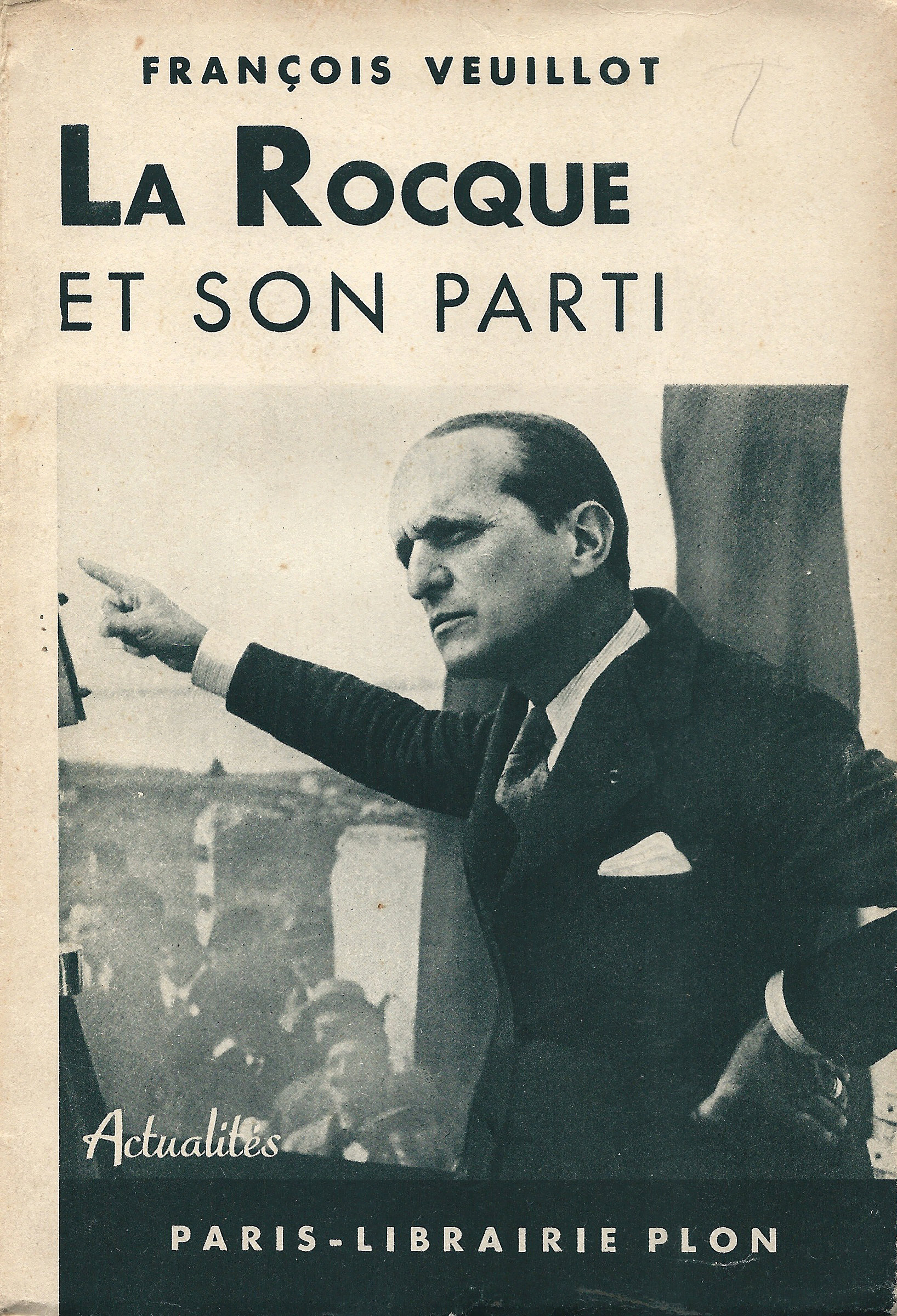 Première de couverture de : La Roque et son parti, par François Veuillot, Paris : librairie Plon, 1938.